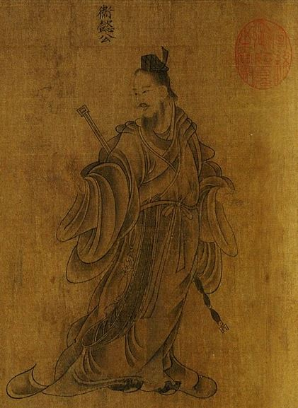 Duque Yi de Wey (衞懿公) de "Mujeres Sabias y Benevolentes" por Ku K'ai-chih. Copia de la dinastía Sung (960-1279) según la obra original del siglo Ⅳ. Ciudad Prohibida, Pequín.